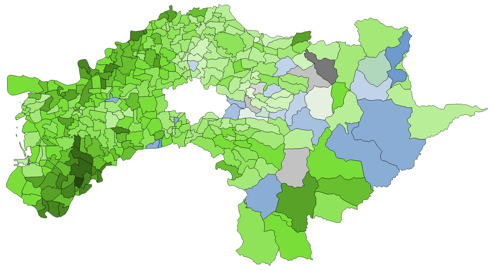 顏色對照表